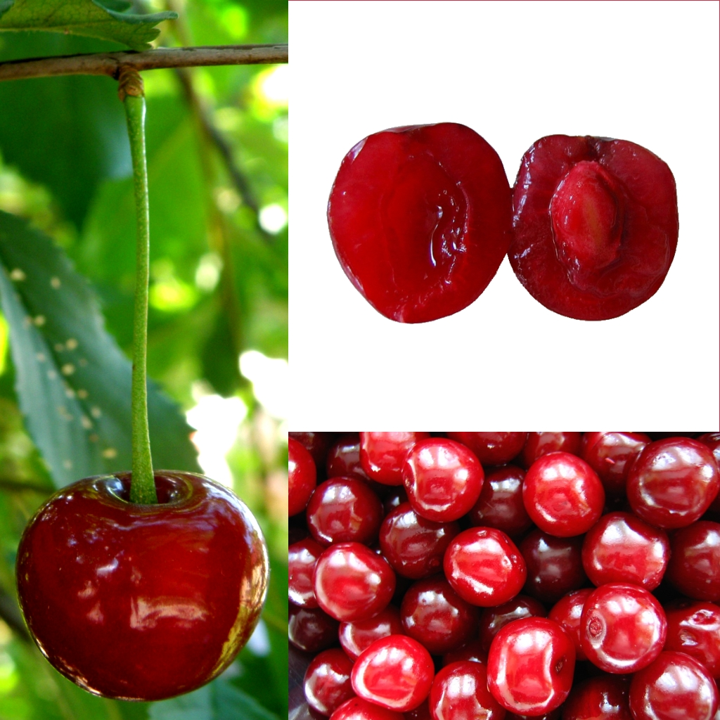 Grafika podręcznika Wikijunior:Owoce. Wiśnia pospolita (Prunus cerasus).